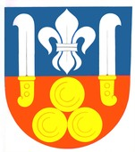 Česky: znak obce Soběchleby